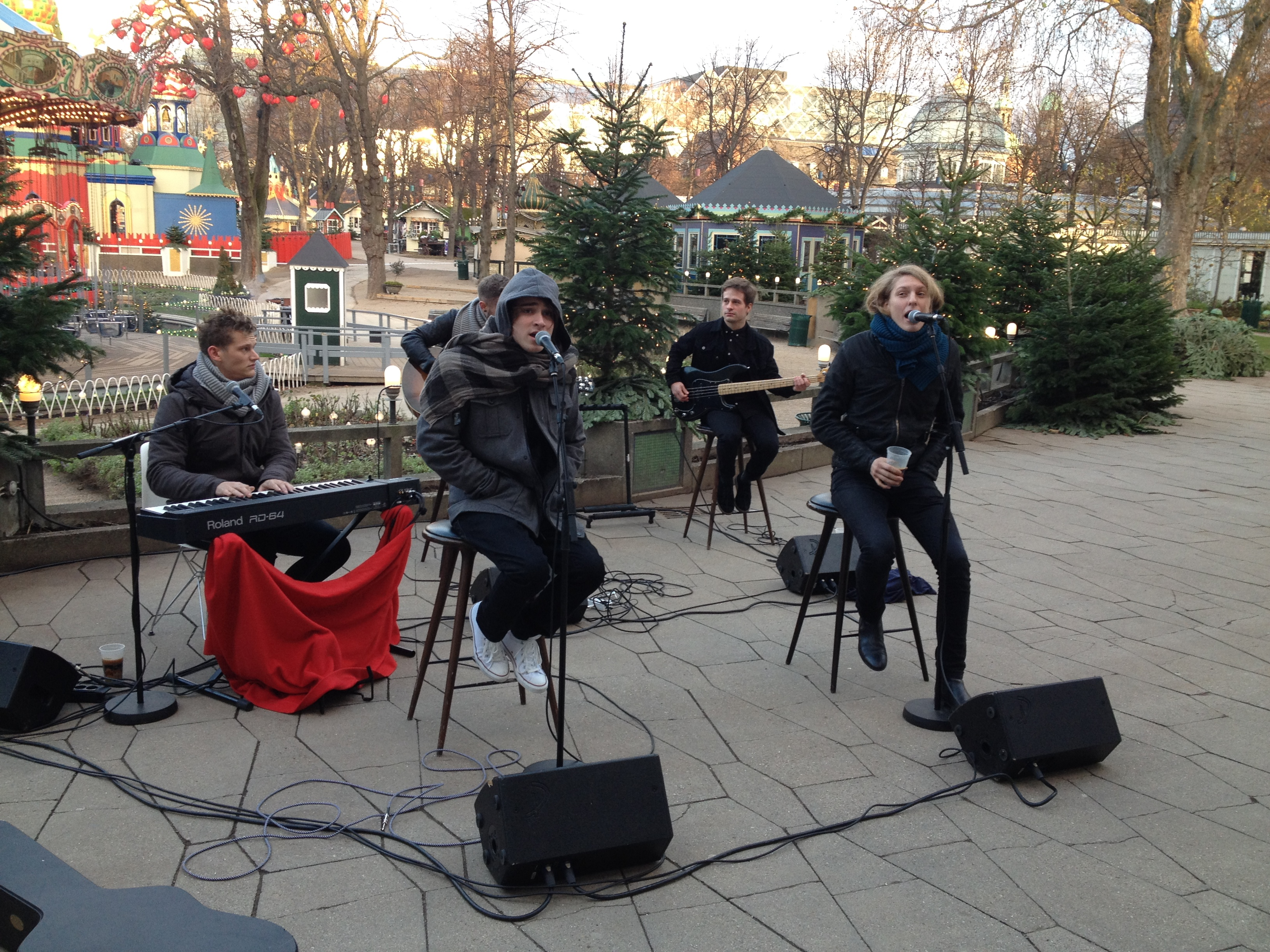 Dúné og Gavyn Bailey under lydprøve i Tivoli, forud for optræden i TV 2 programmet GO' Morgen Danmark.